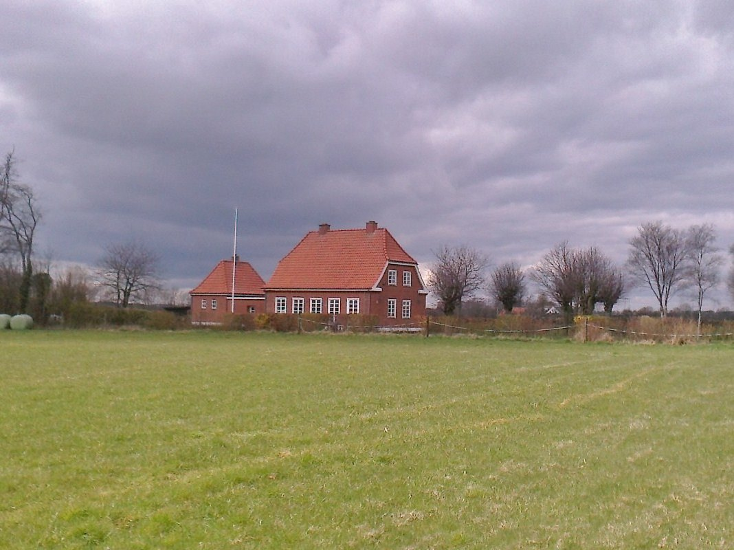 Gamst Station